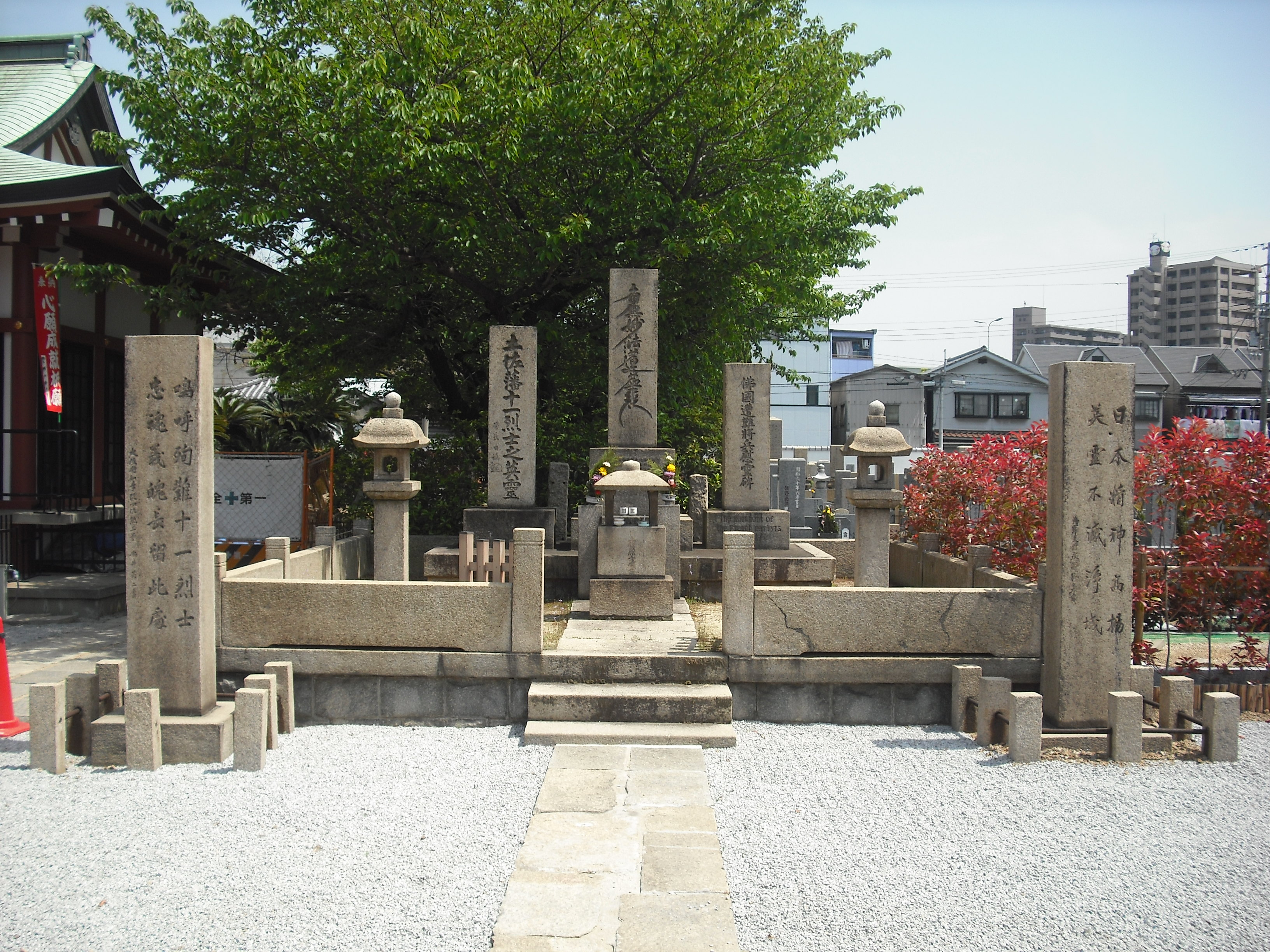 堺事件により妙国寺で切腹した土佐藩士の供養塔